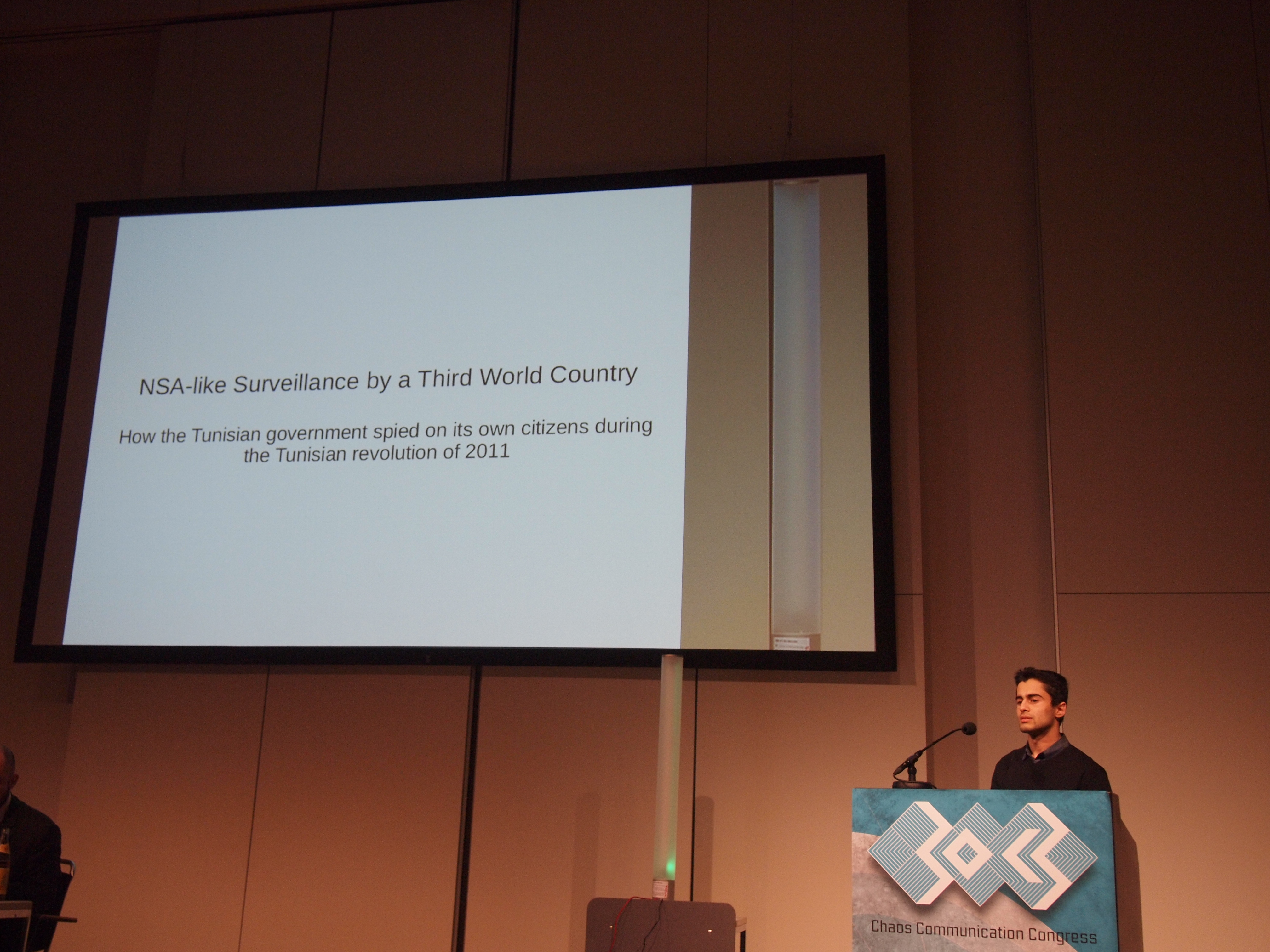 30C3: Mustafa Al-Bassam aka Musalbas aka TFlow (ex LulzSec) beim Vortrag "NSA-like Surveillance by a Third World Country"